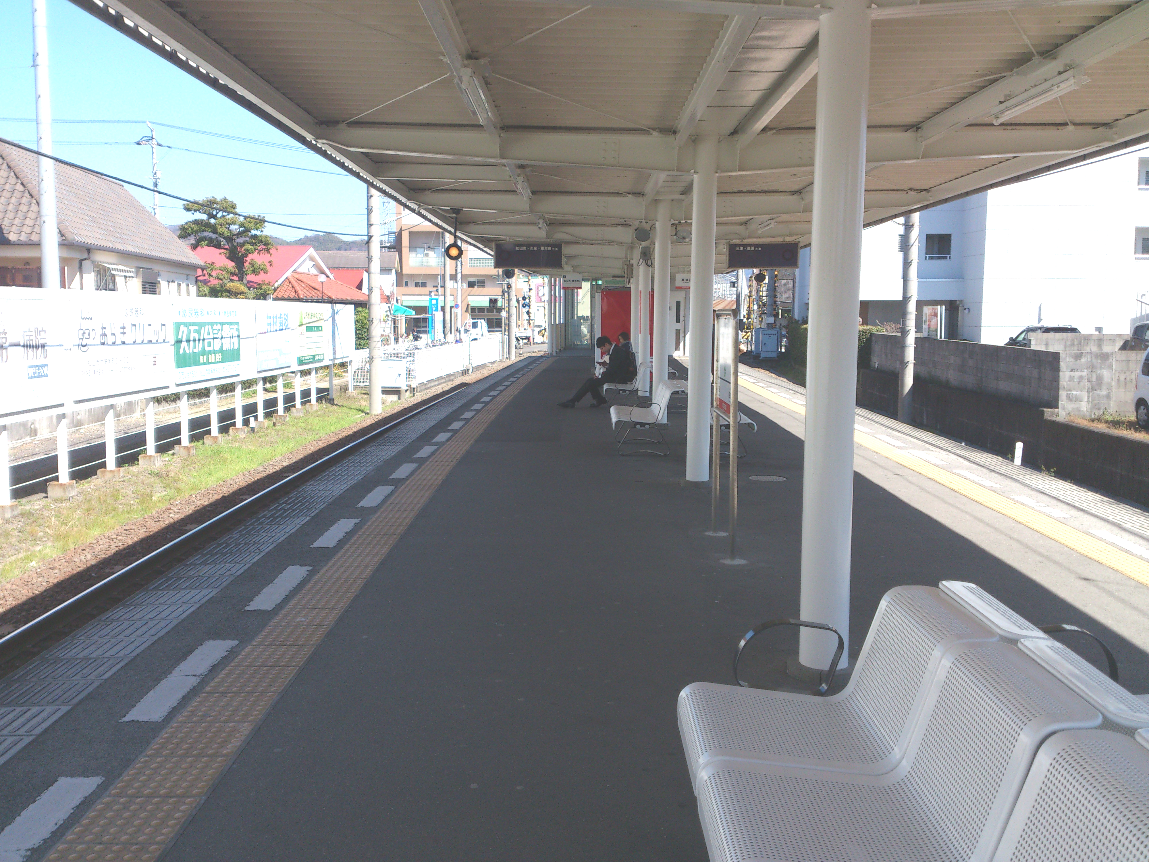 伊予鉄道、衣山駅ホームです。